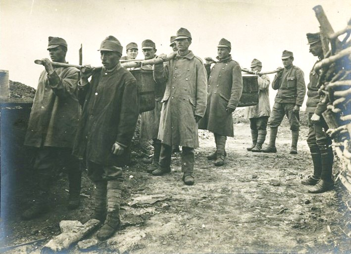 Снимка на носачи за храна за стрелковите окопи на австро-унгарската армия.